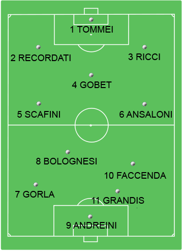 Formazione della Reggina datata 4 dicembre 1932